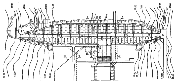 Vedere de sus a barajului Valea Uzului